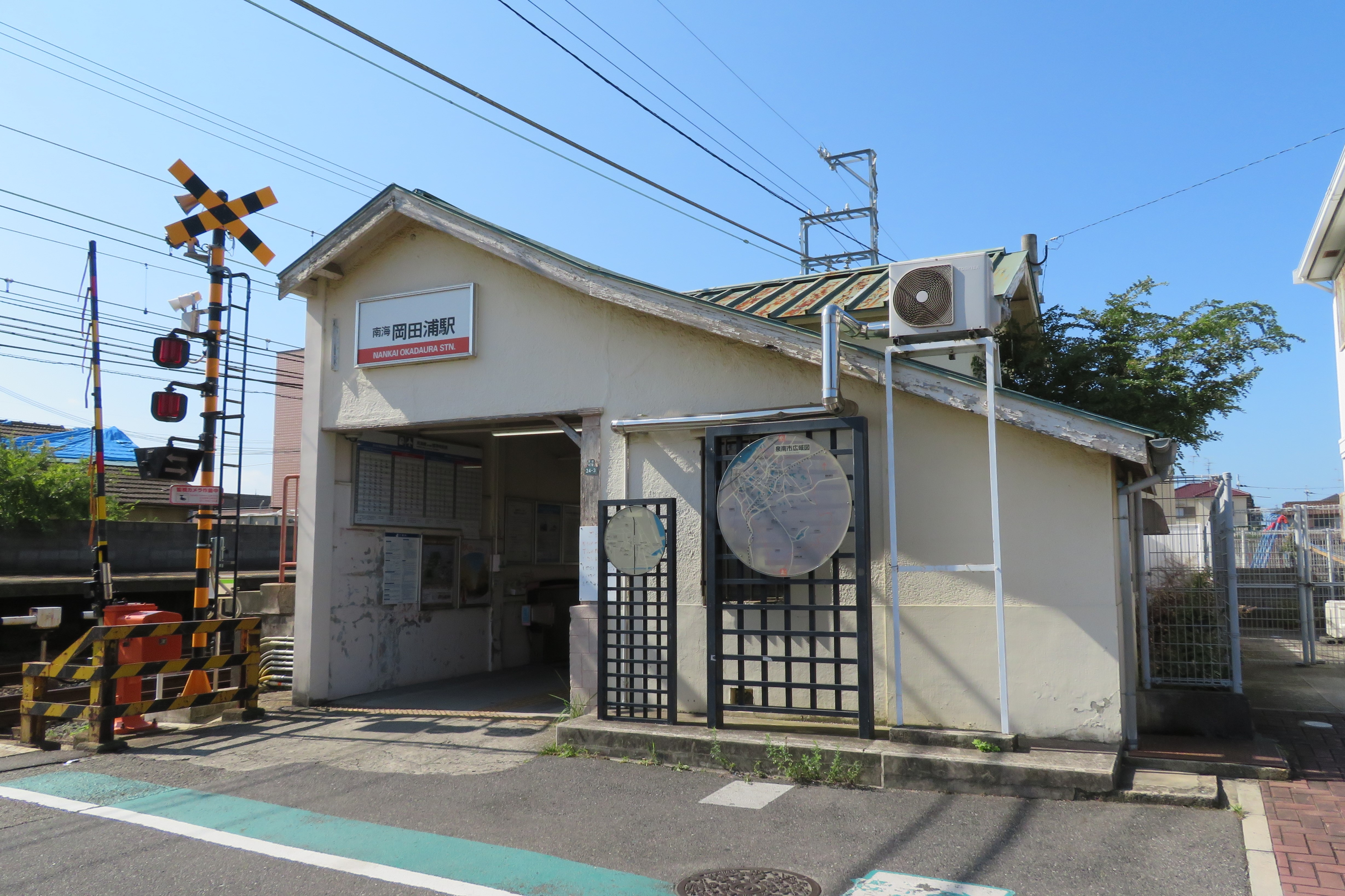 南海電鉄岡田浦駅